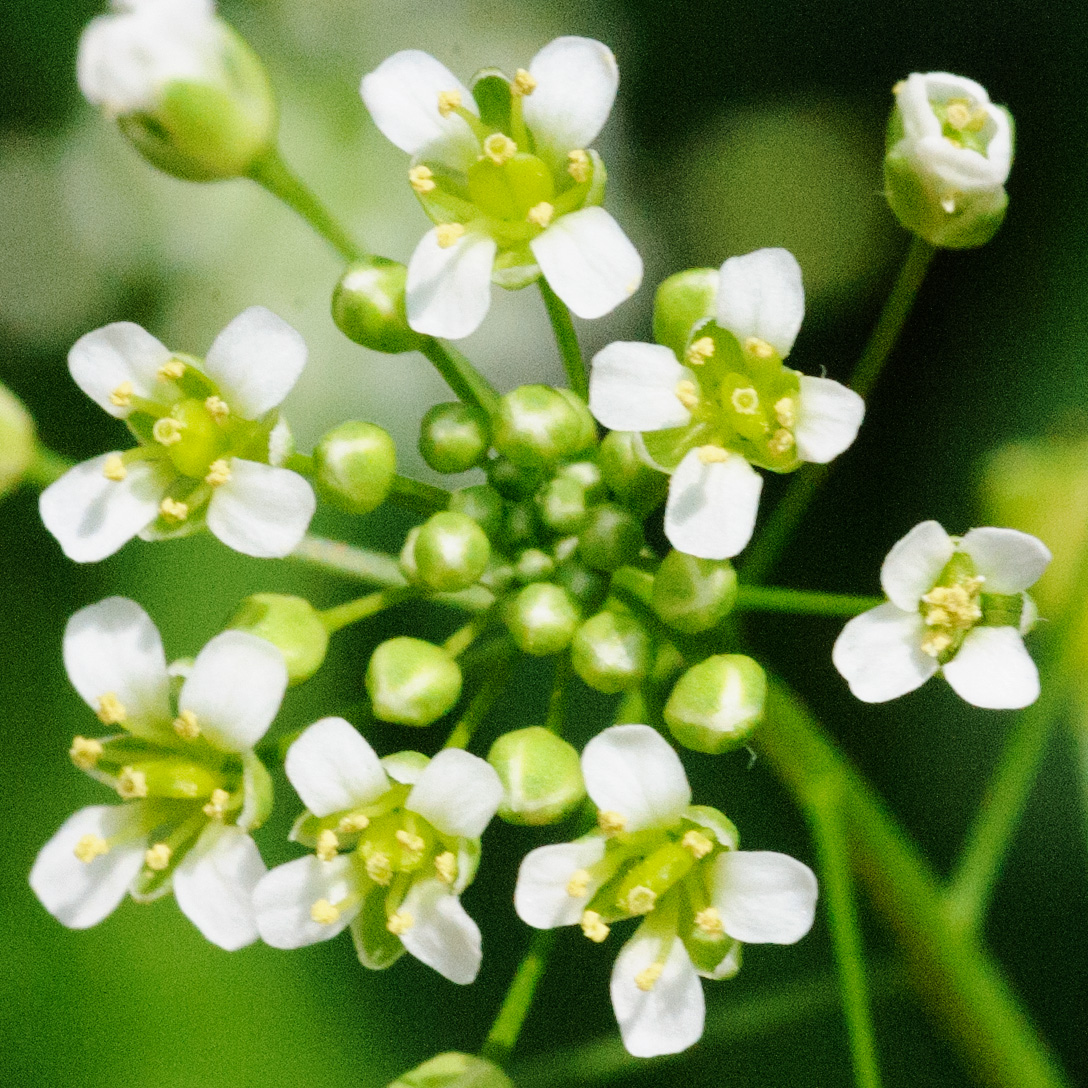 соцветие пастушьей сумки